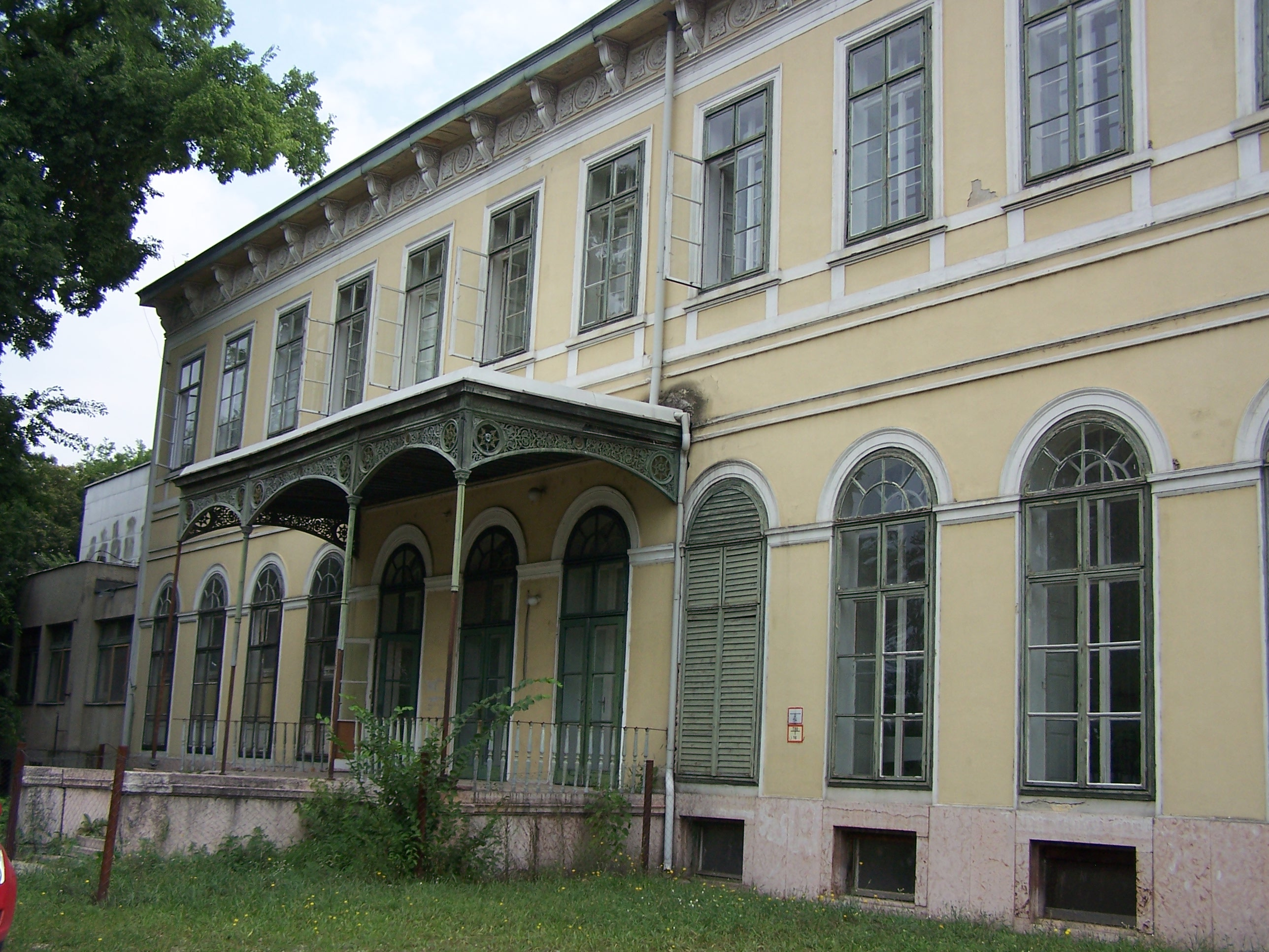 Volt Károlyi kastély (Fót, Vörösmarty Mihály tér 2.) This is a photo of a monument in Hungary, Identifier: 7023